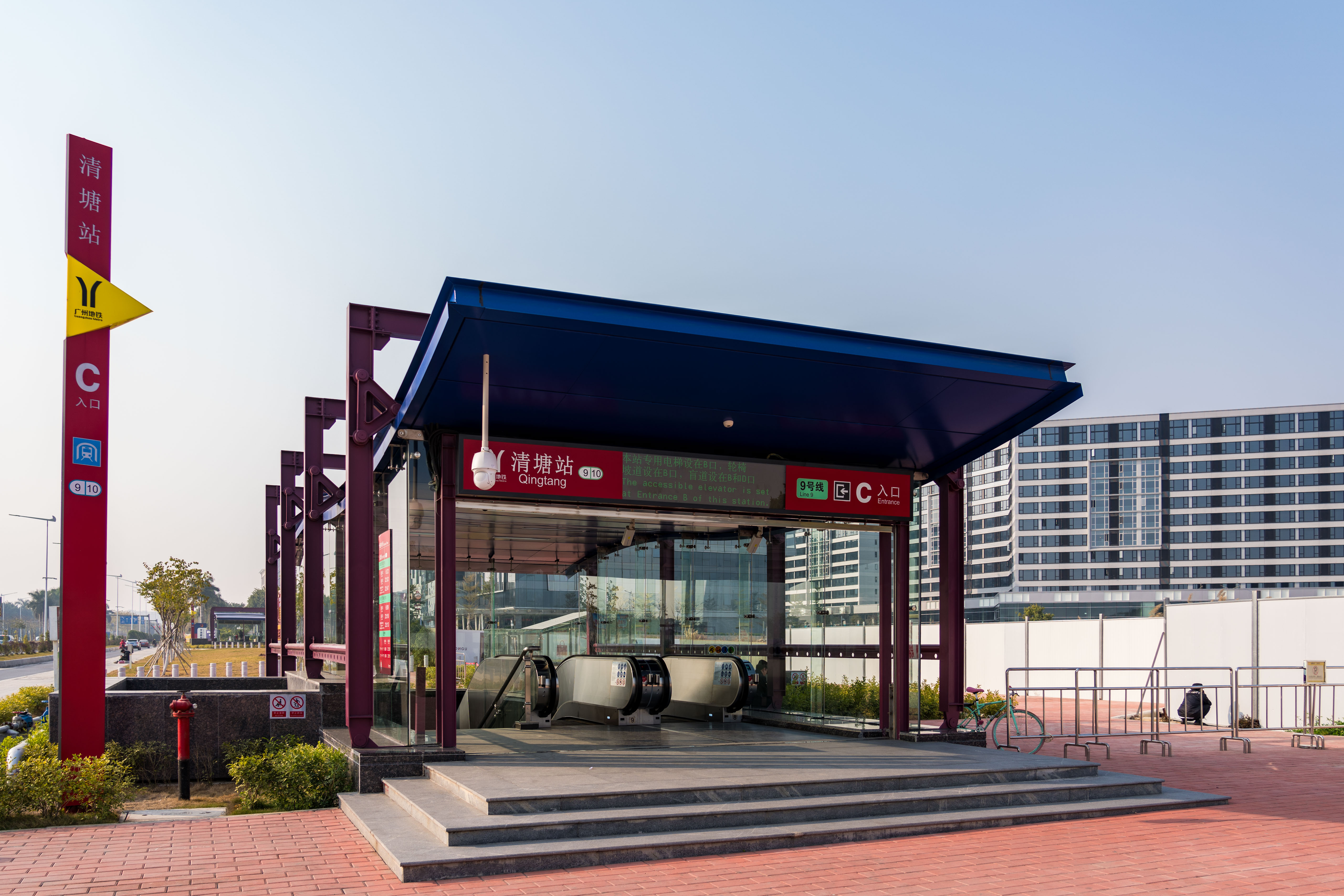 广州地铁9号线清塘站C出口